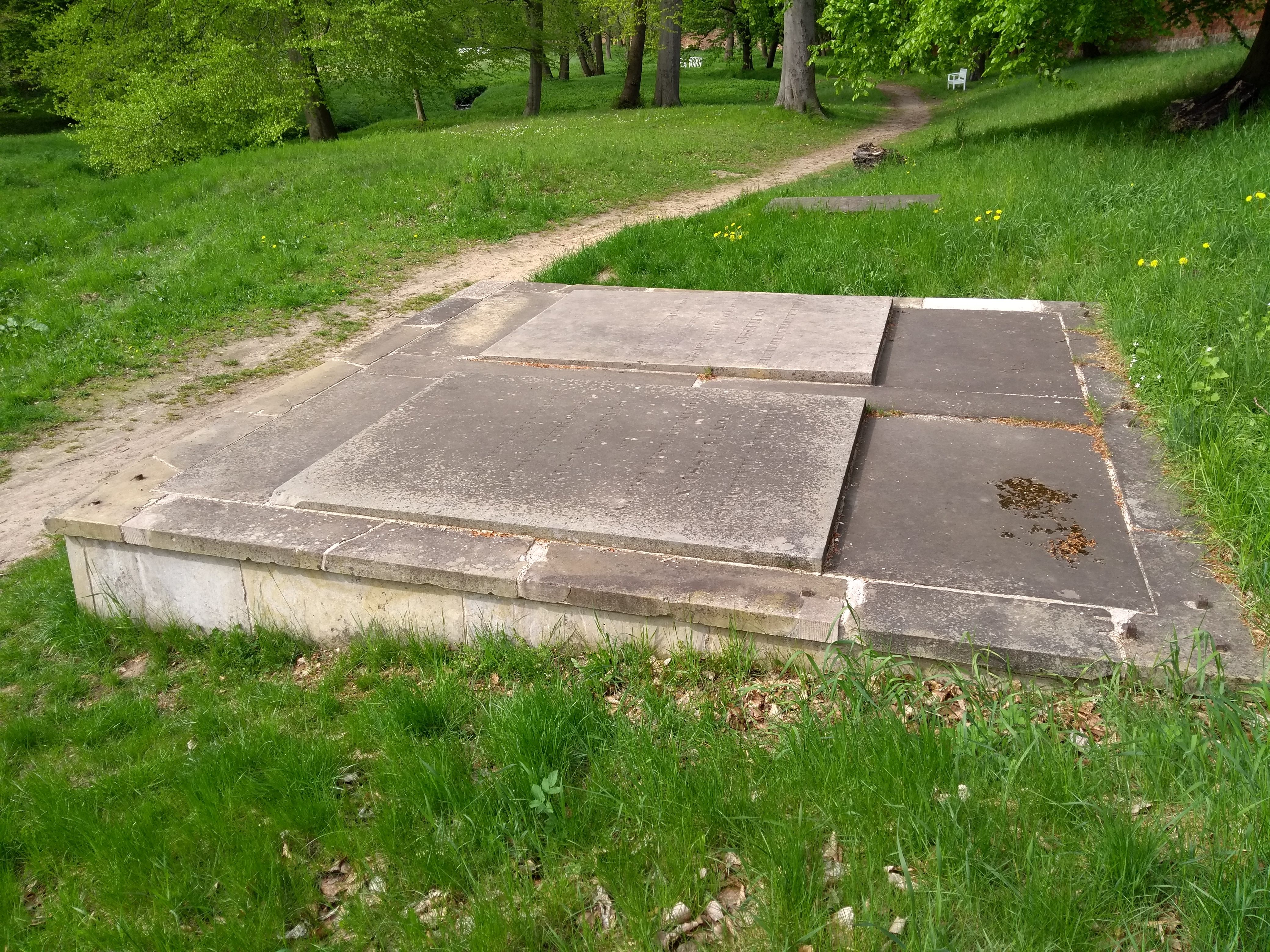 Bad Doberan Klosterfriedhof, Grabmal Plessen